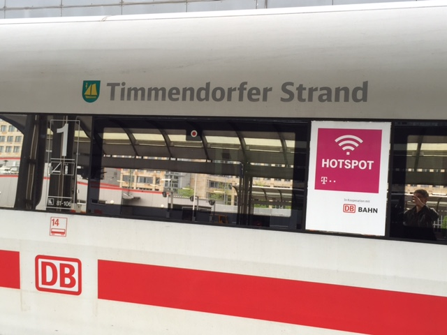 ICE Triebkopf "Timmendorfer Strand"